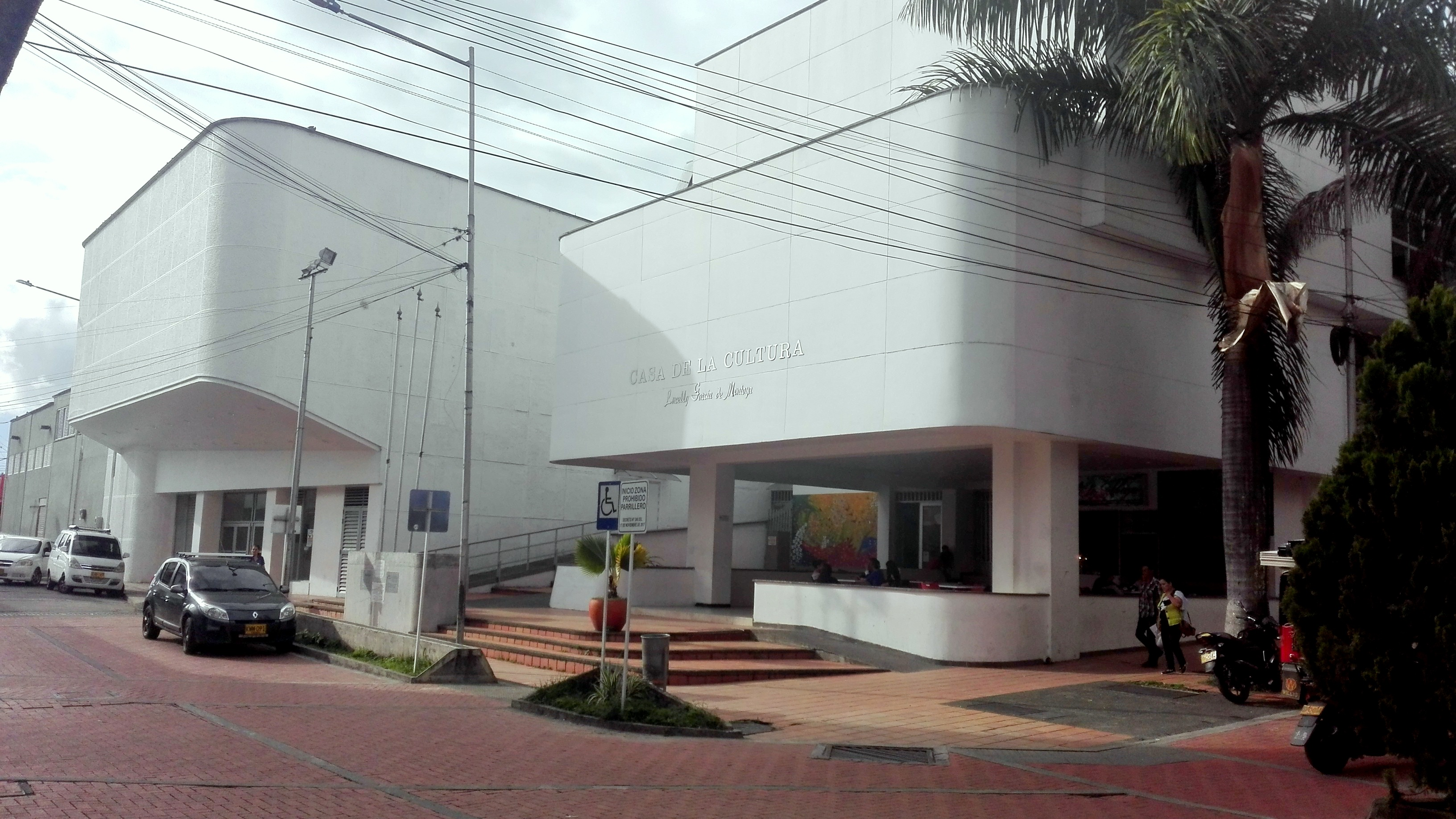 Casa de la Cultura del municipio de Calarcá, Quindío